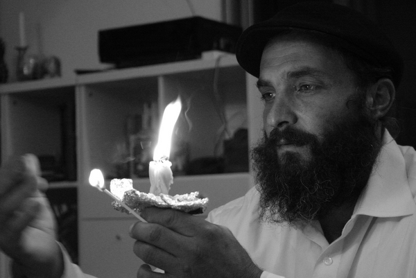 ברכה על האש בטקס ההבדלה